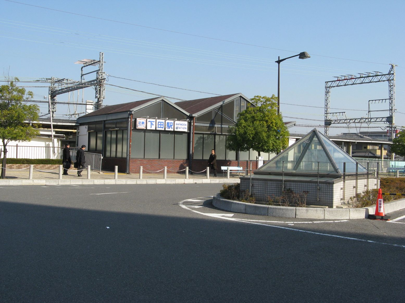 近鉄下田駅 南口